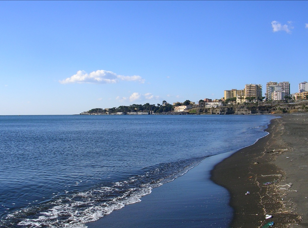 Torre Annunziata , Campania, Italia